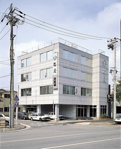 石昆（本社ビル）